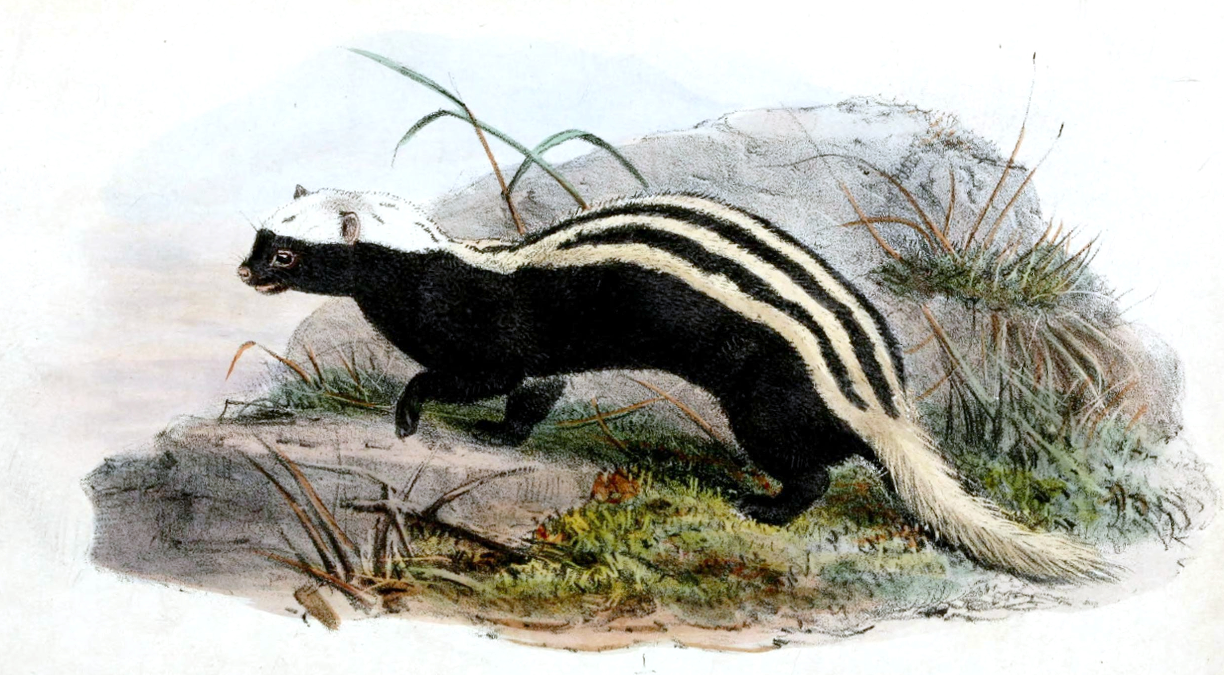 Zorilla albinucha=Poecilogale albinucha